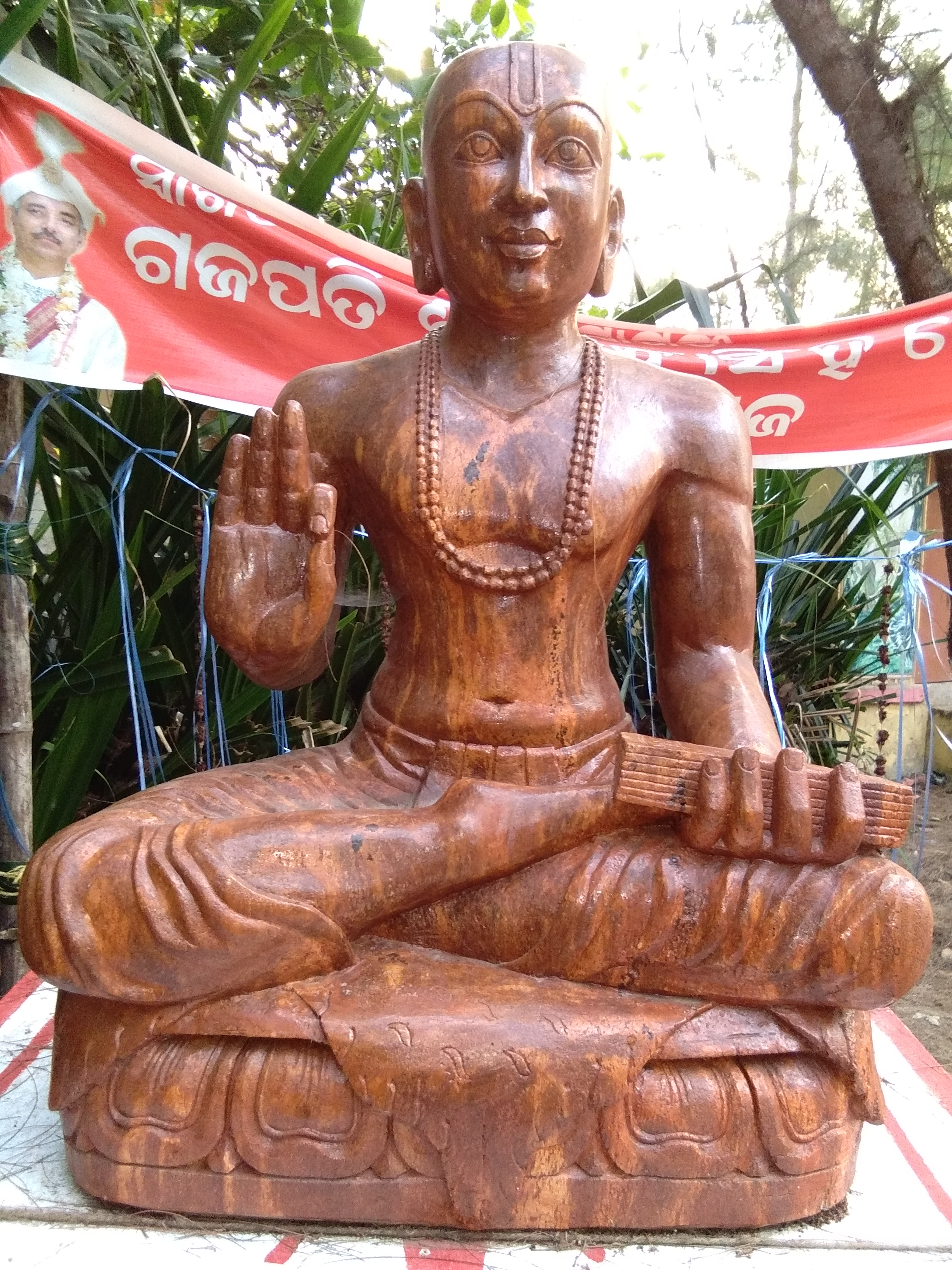 Sri Chaitanya